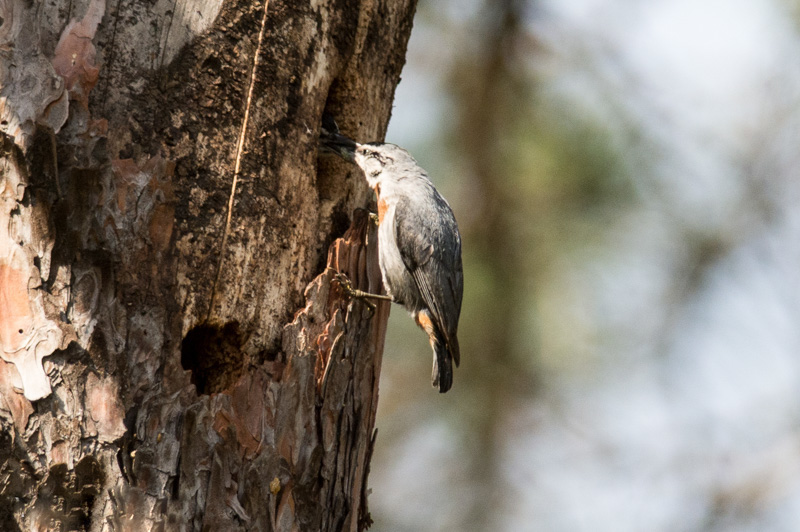 turkse_boomklever-2.jpg